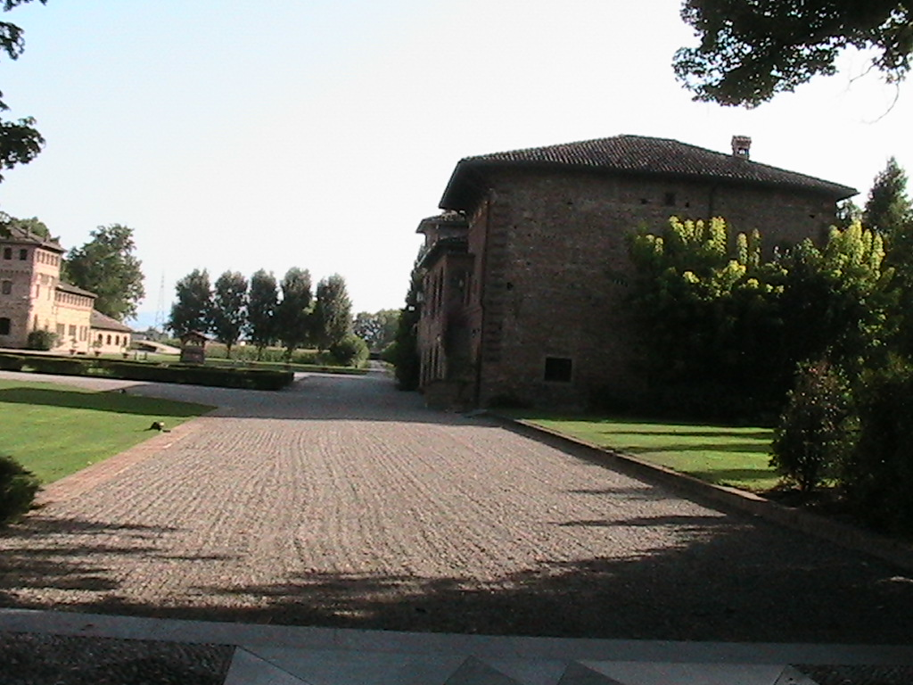 Castelguelfo (Fontevivo) Il castello Pallavicino